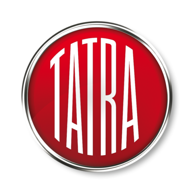 LOGO TATRA 3D